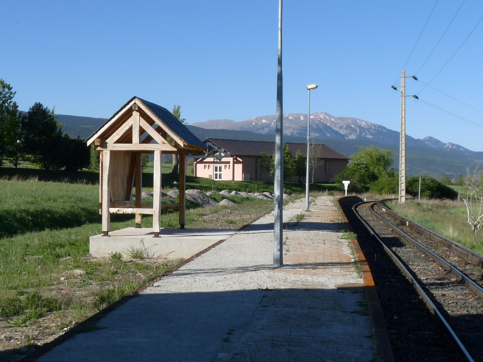 Gare de Sainte-Léocadie, Pyrénées-Orientales, France